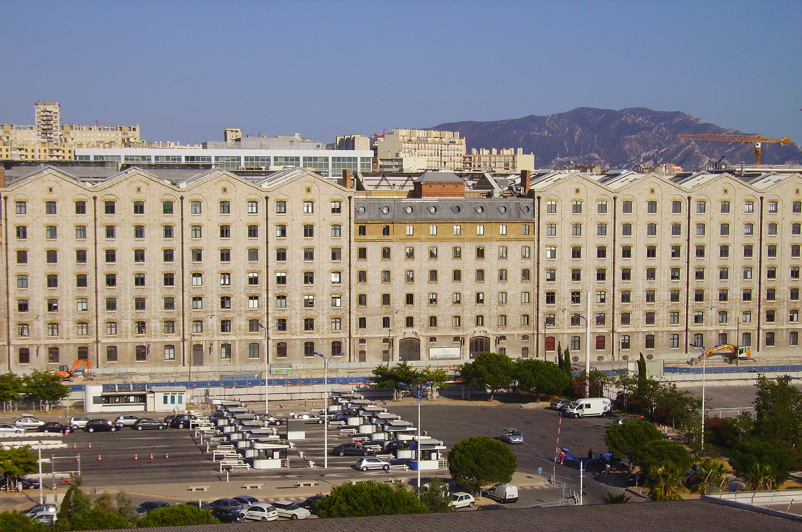 Les bâtiments des docks du port de Marseille-Joliette vus depuis le ferry Napoléon Bonaparte le 1 août 2009.